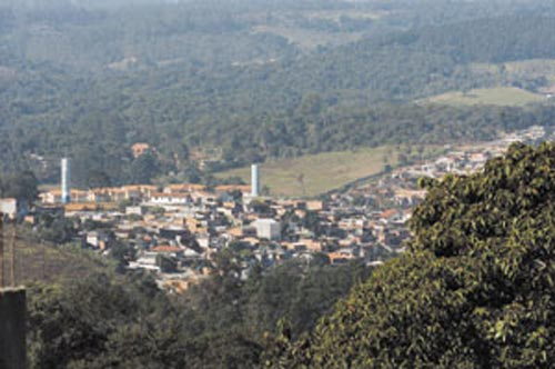 Cidade de Cotia(ao fundo)